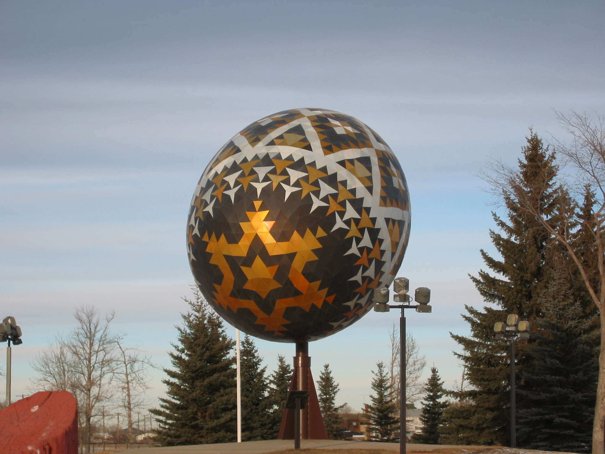 Ukrainian Pysanka (egg) in Vegreville, Alberta, Canada